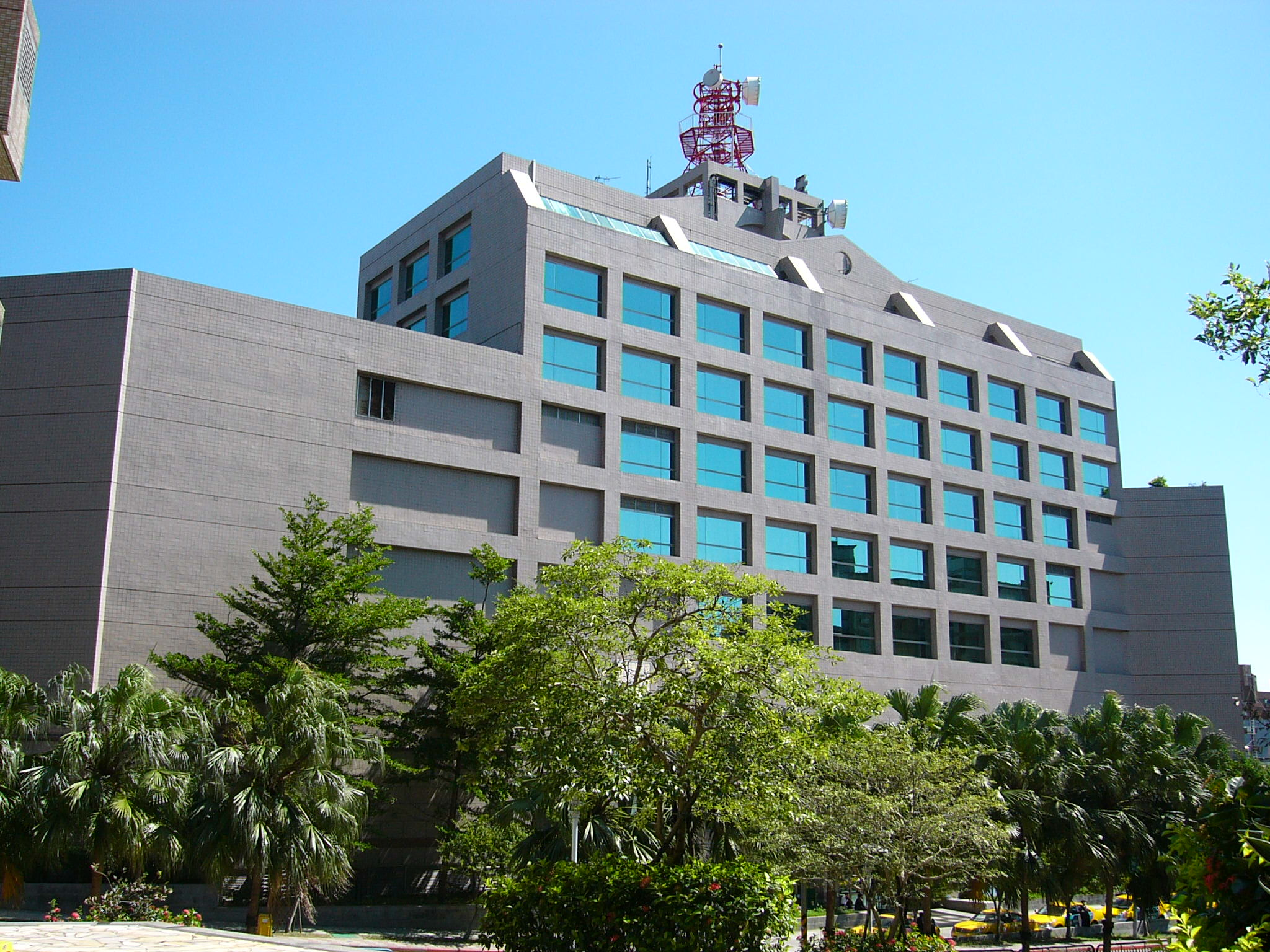 公共電視文化事業基金會A棟大樓上半部前方外觀